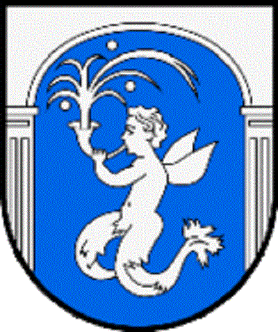 Das Wappen nimmt in seiner Symbolik Bezug auf alle drei Ortsteile: Bad Tatzmannsdorf, Jormannsdorf und Sulzriegel.